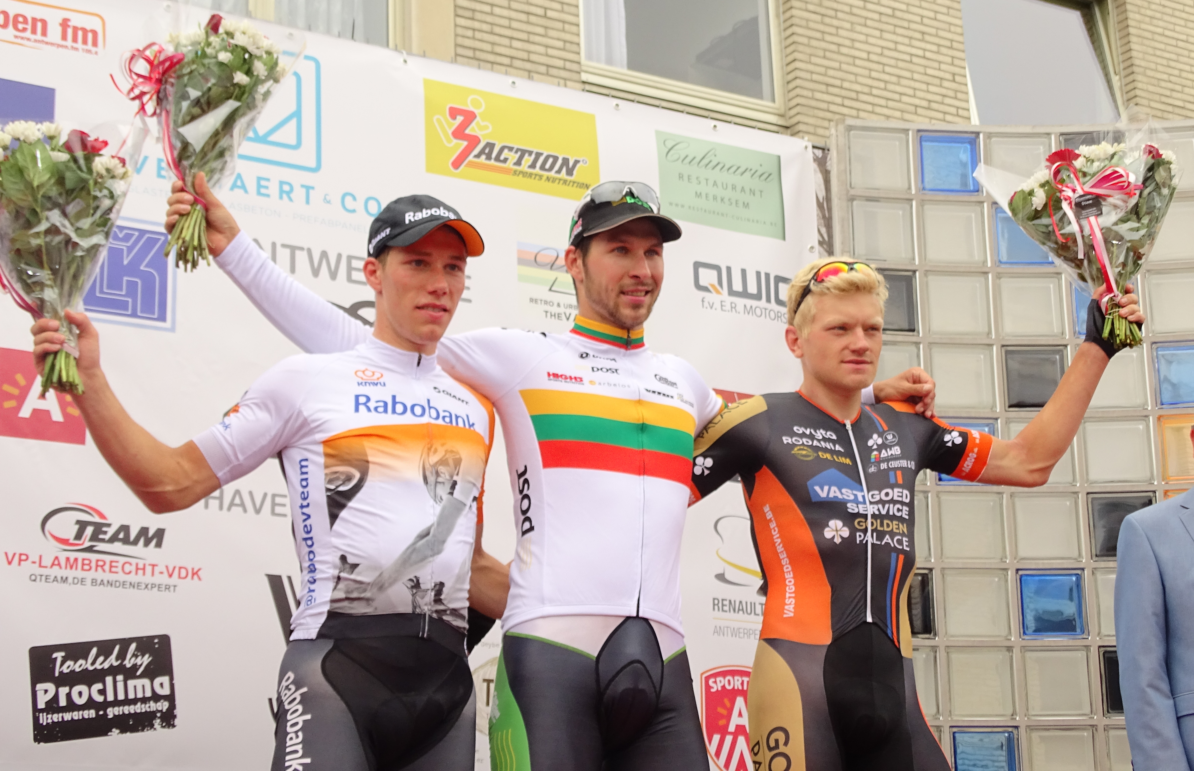 Reportage réalisé le dimanche 9 août à l'occasion de l'arrivée de la Flèche du port d'Anvers 2015 à Merksem (Anvers), Belgique.